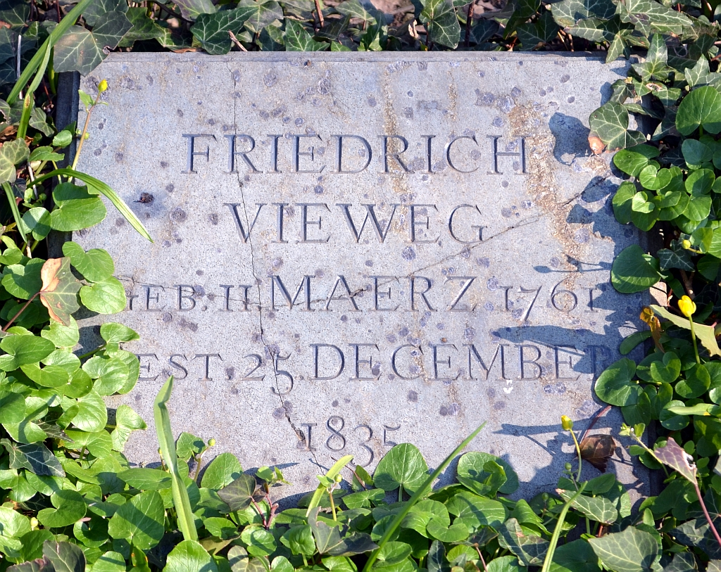 Braunschweig, Magnifriedhof: Grab Friedrich Viewegs.